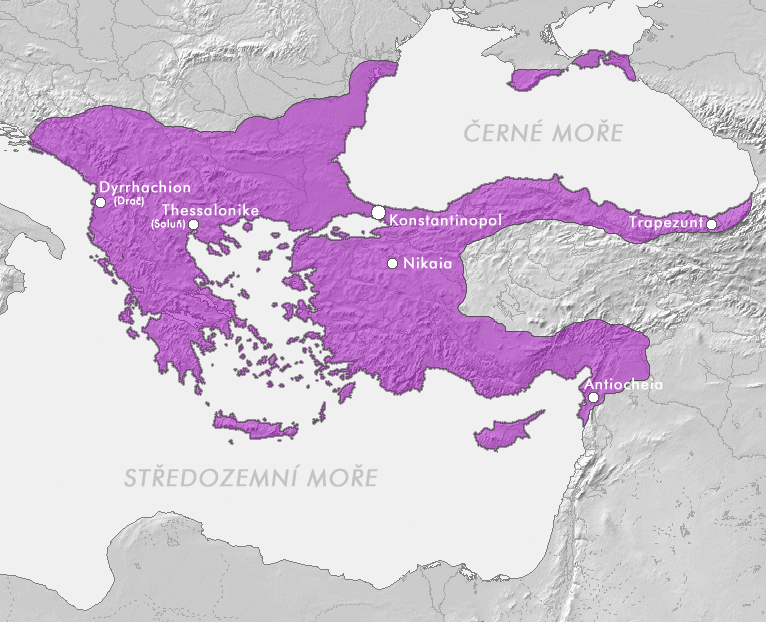 Byzanc před porážkou u Myriokefala roku 1176 a 4. křížovou výpravou.